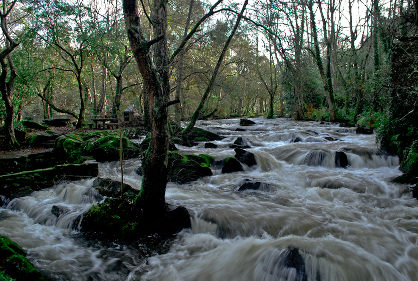 Verdes, Coristanco. Galiza